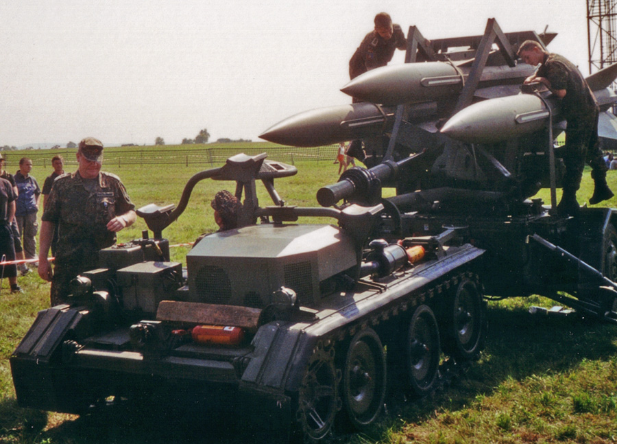 Beschreibung: Hawk System der Bundeswehr